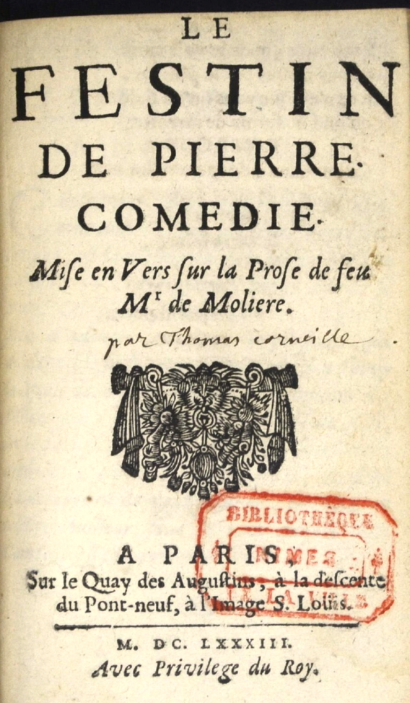 Page de titre du Festin de pierre versifié par T. Corneille.